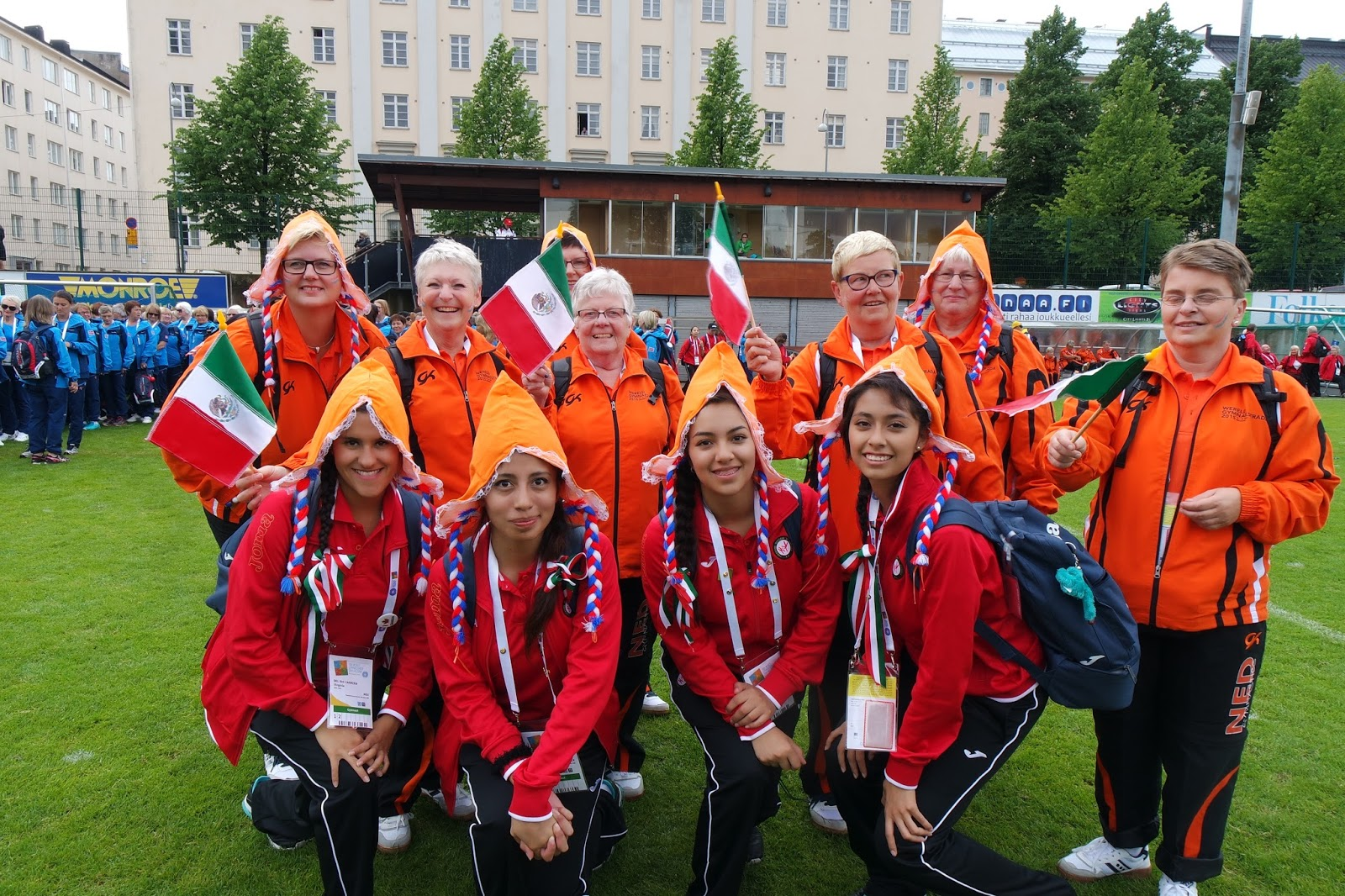 Gymnaestrada Mundial #15 Helsinki Finlandia, ceremonia de inaguración.